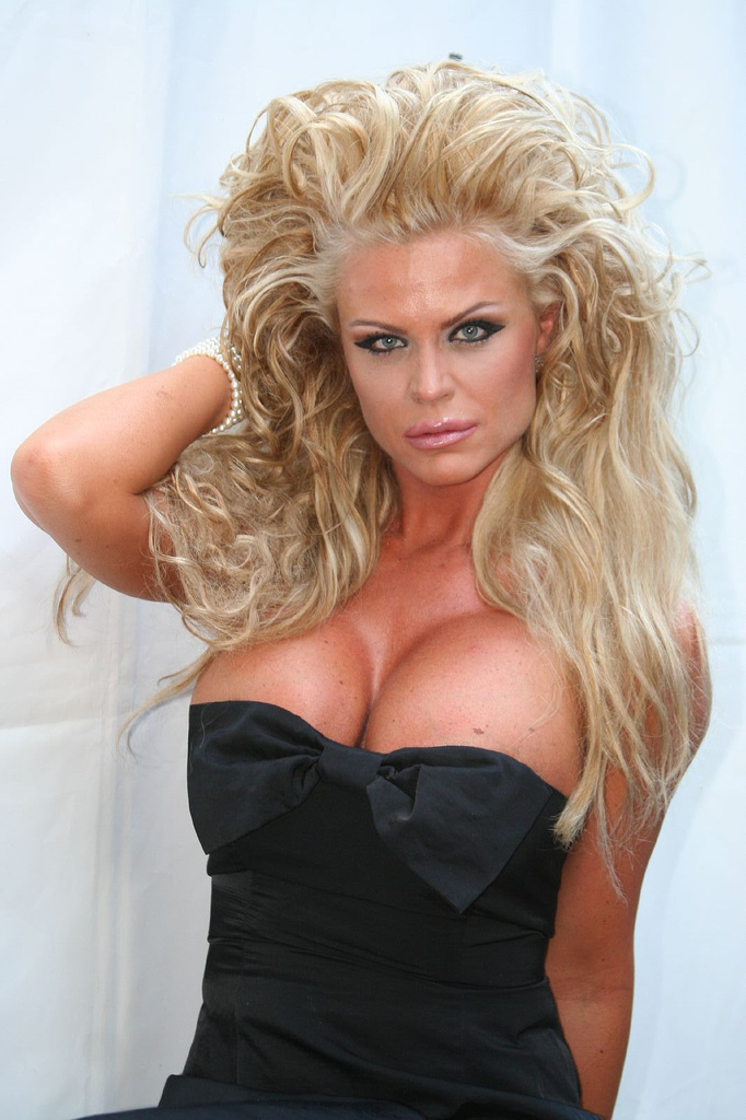 Linda Rosing during Stockholm Pride 2007.